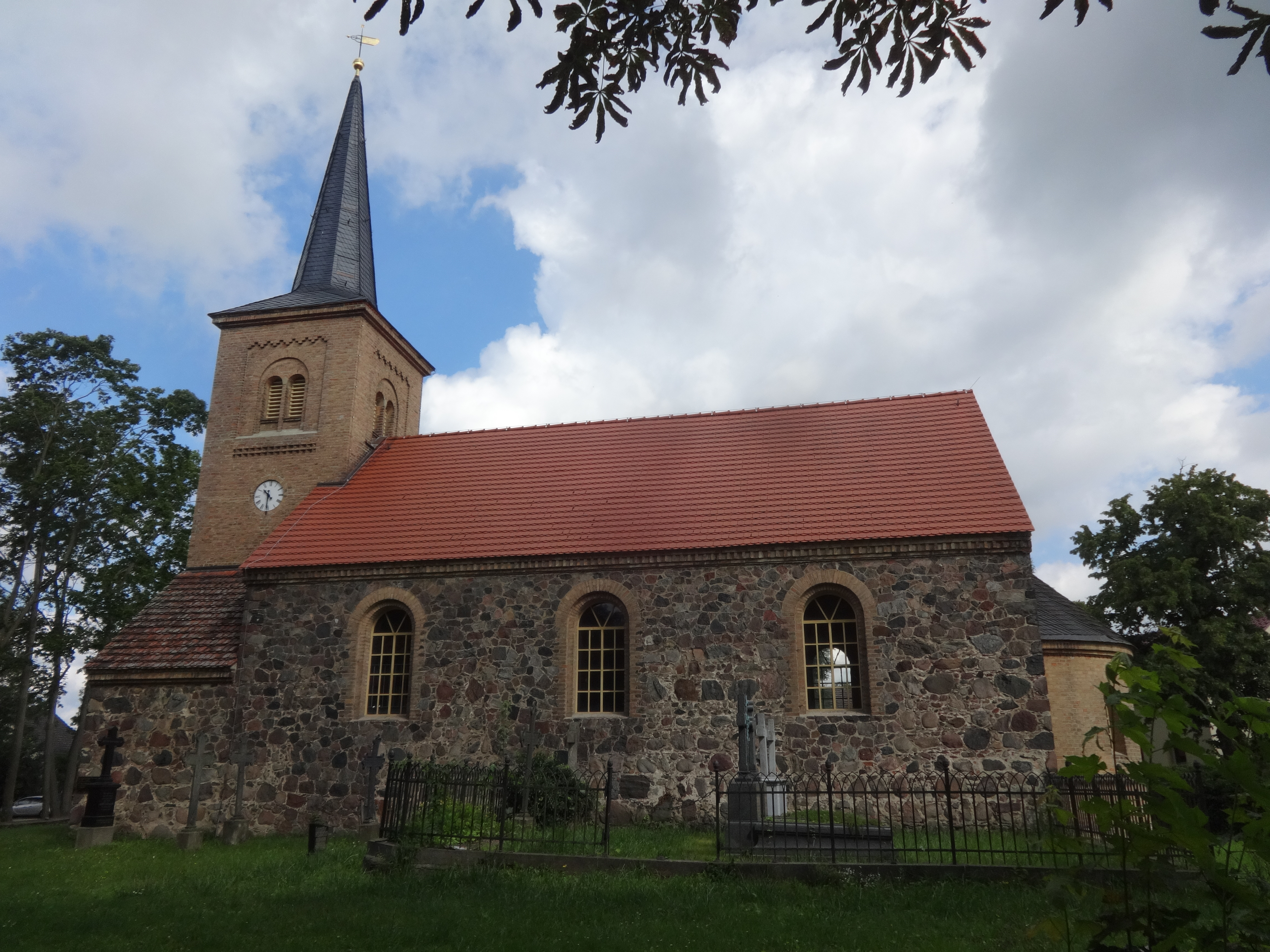 Die Dorfkirche Jühnsdorf ist eine Feldsteinkirche, die vermutlich im 14. Jahrhundert errichtet wurde. 1869 baute die der Baumeister Klehmet aus Zossen um und erweiterte sie unter anderem um eine halbkreisförmige Apsis und den Westturm. Die Kirchenausstattung stammt im Wesentlichen aus dem 19. Jahrhundert.